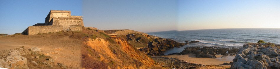 Ilha do Pessegueiro, Portugal